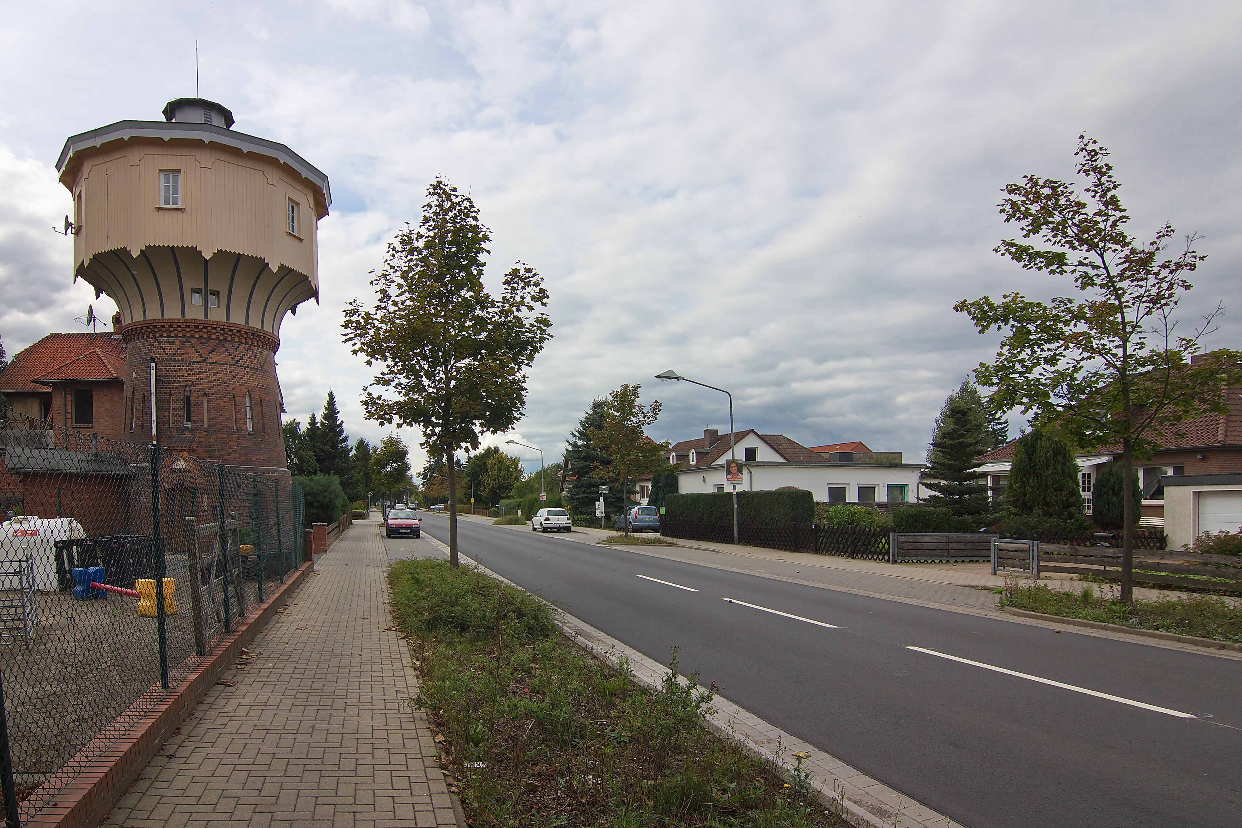 Wasserturm der ehemaligen Kleinbahn Celle-Wittingen in Wittingen